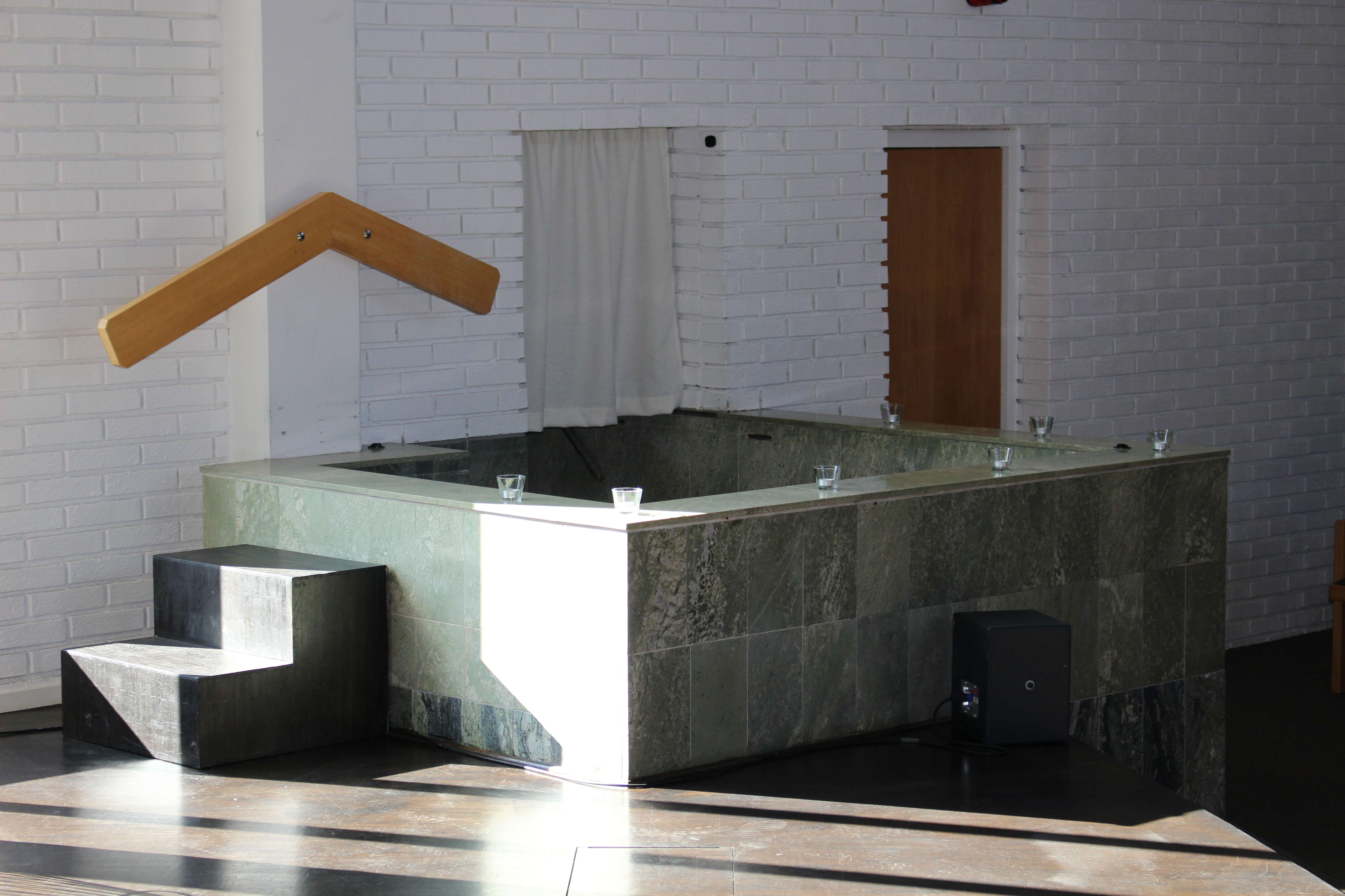 Pingstkyrkan i Västerås.